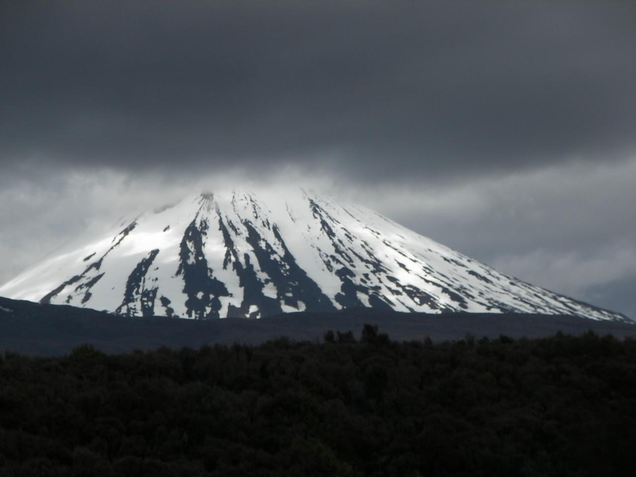 Mt. Ruapehu, donde se rodó Mordor para El Señor de los Anillos.